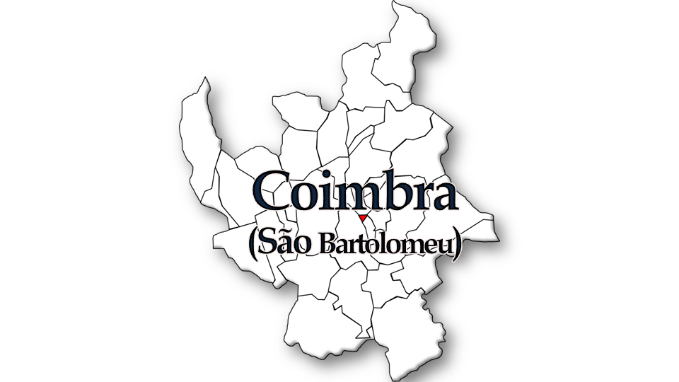 População